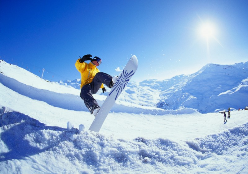 Salto snowboard